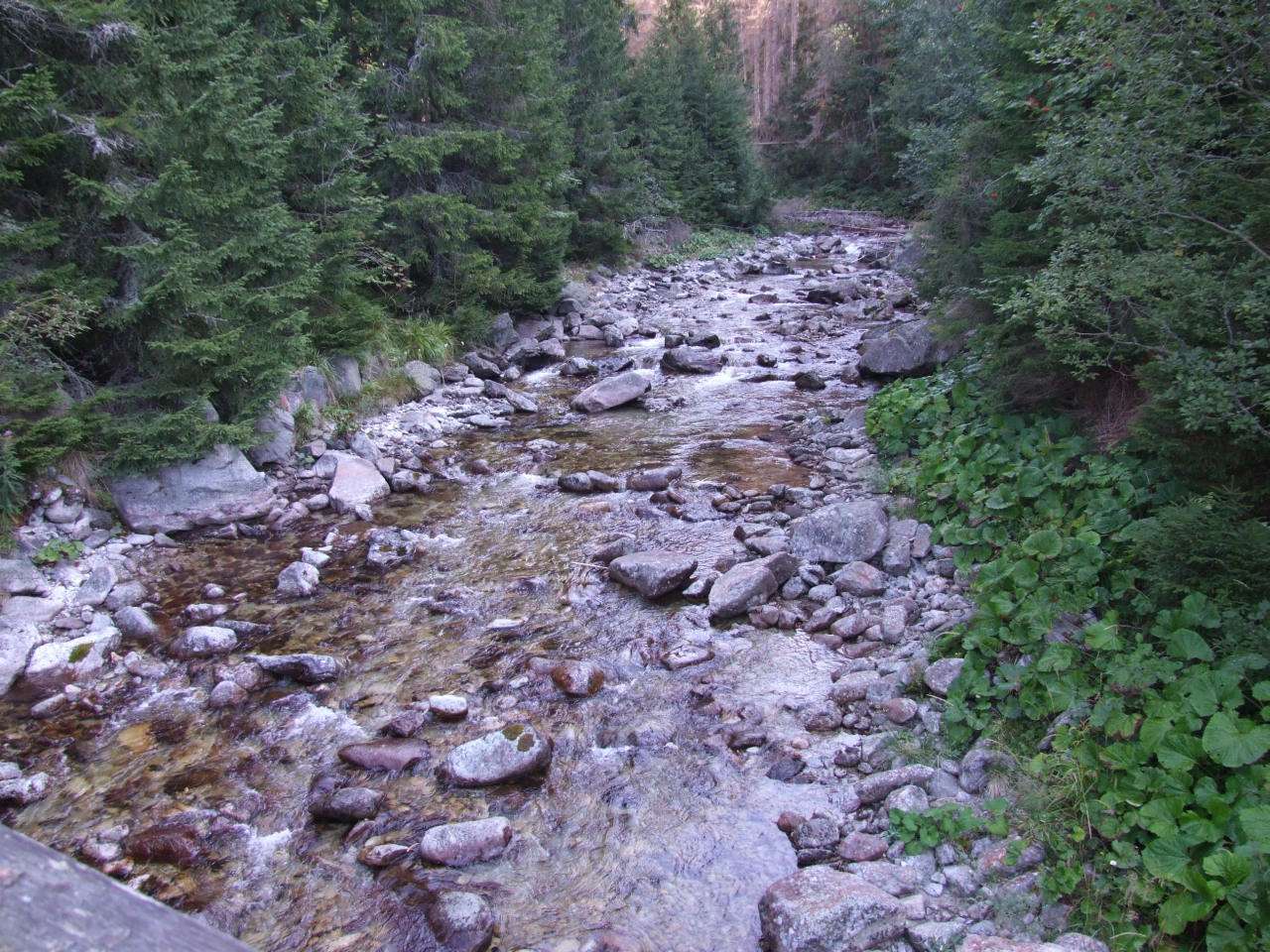 Koprowa Woda